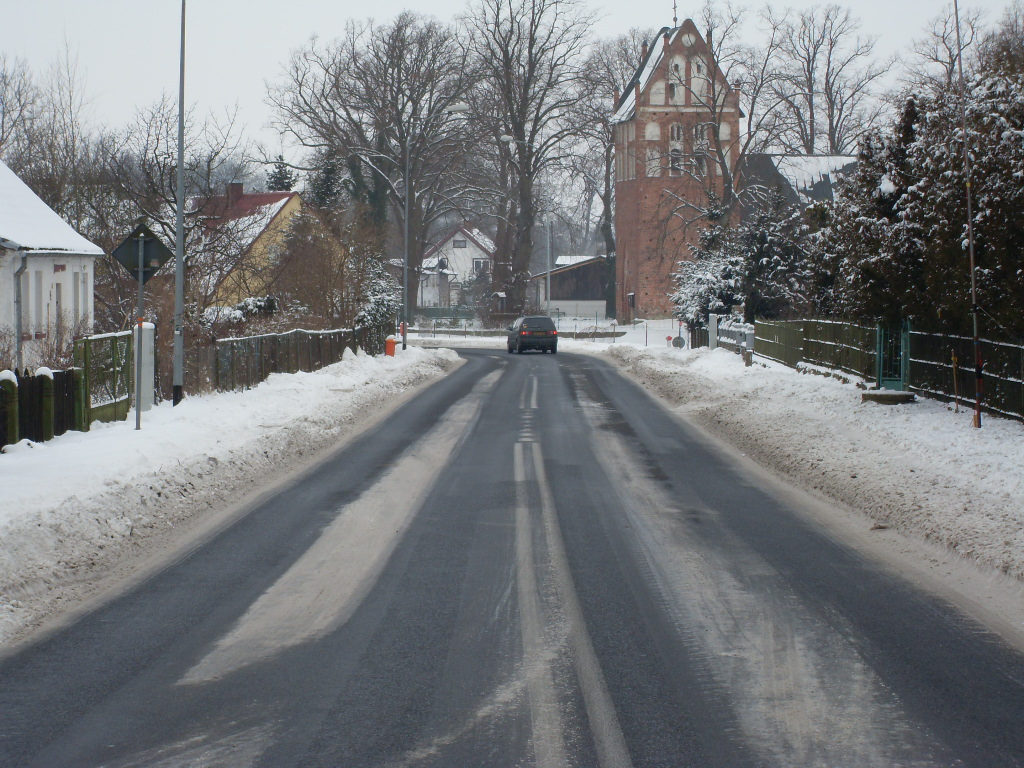 Droga wojewódzka nr 163 we Wrzosowie